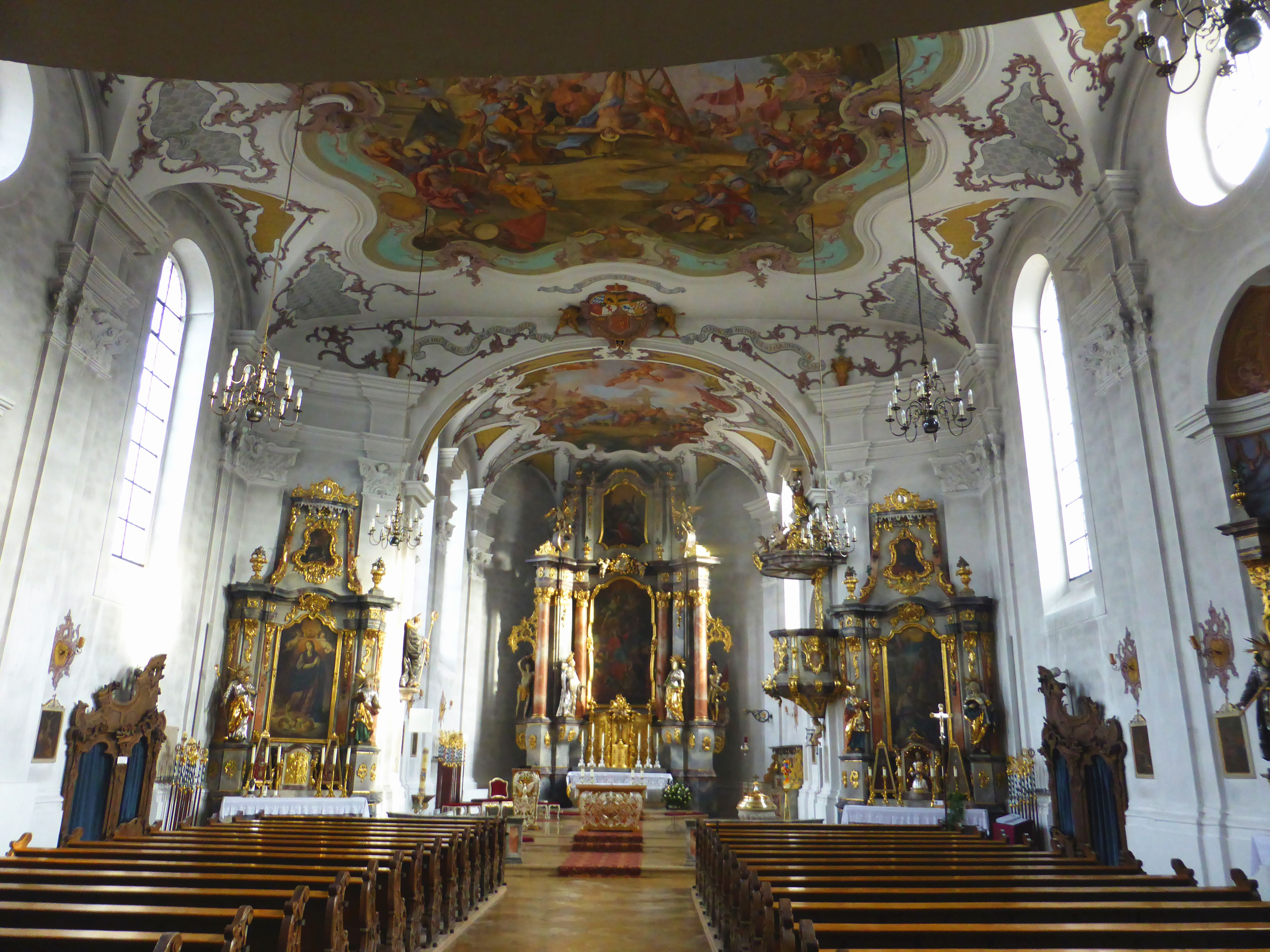 Inneraum der Pfarrkirche St. Peter und Paul in Beratzhausen